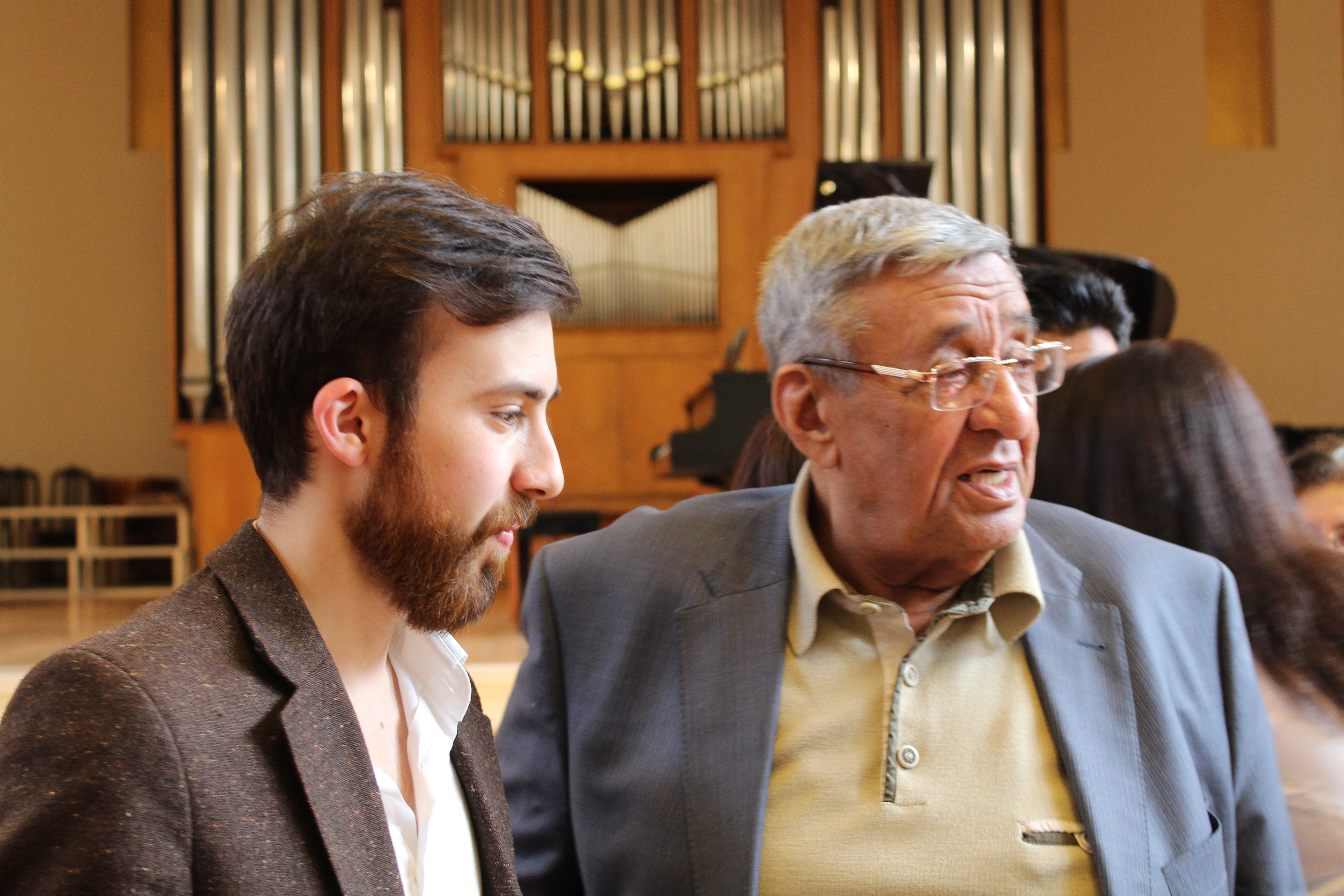 R.Kuliev and A.Melikov